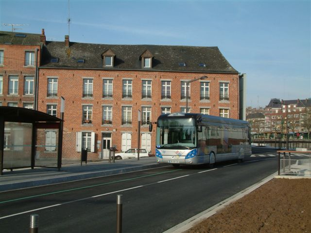 BHNS de Stibus, Maubeuge